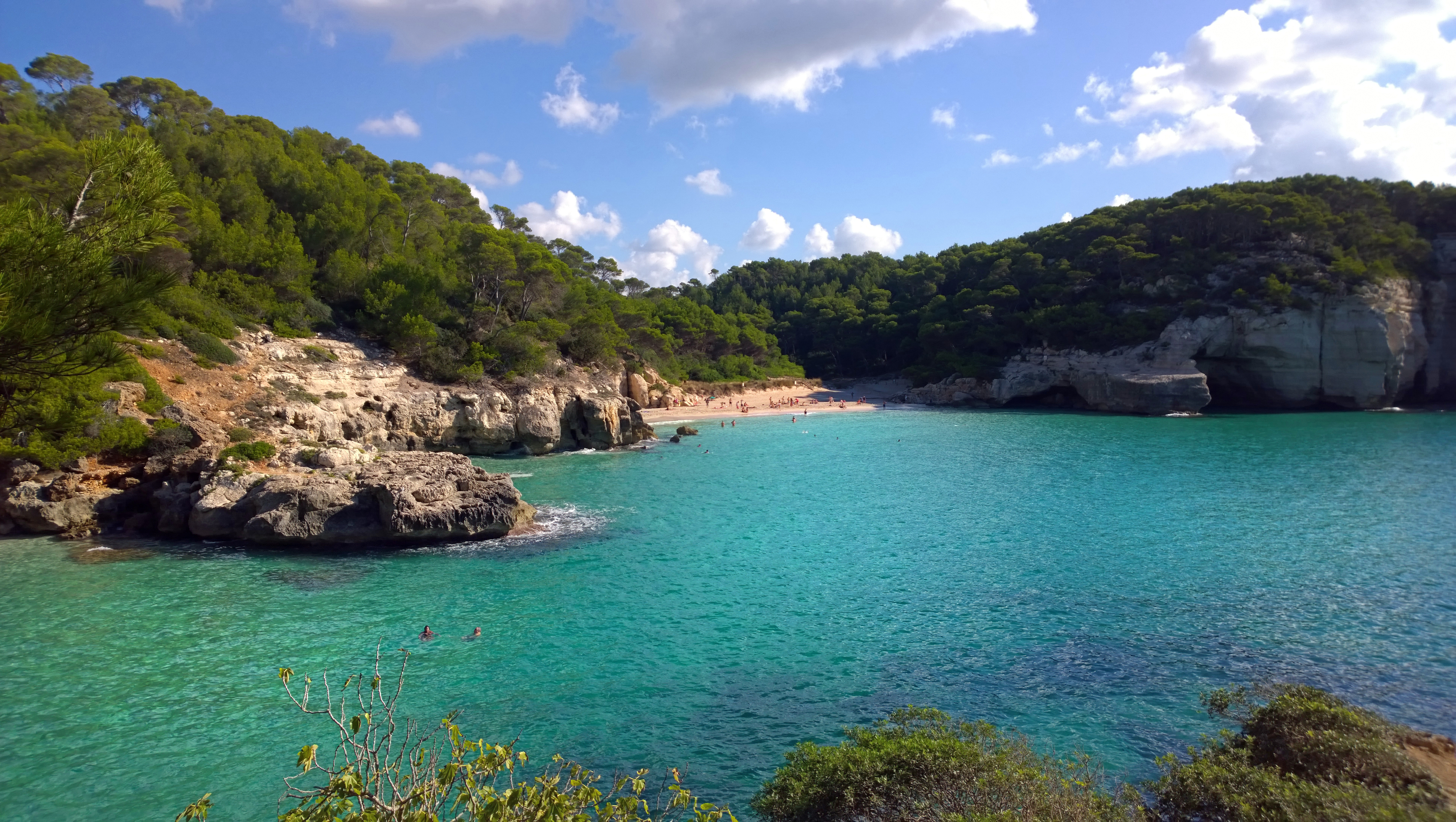 Cala Mitjana